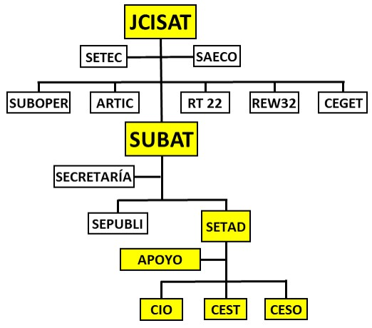 Organigrama de la Asistencia Técnica en el Ejército de Tierra